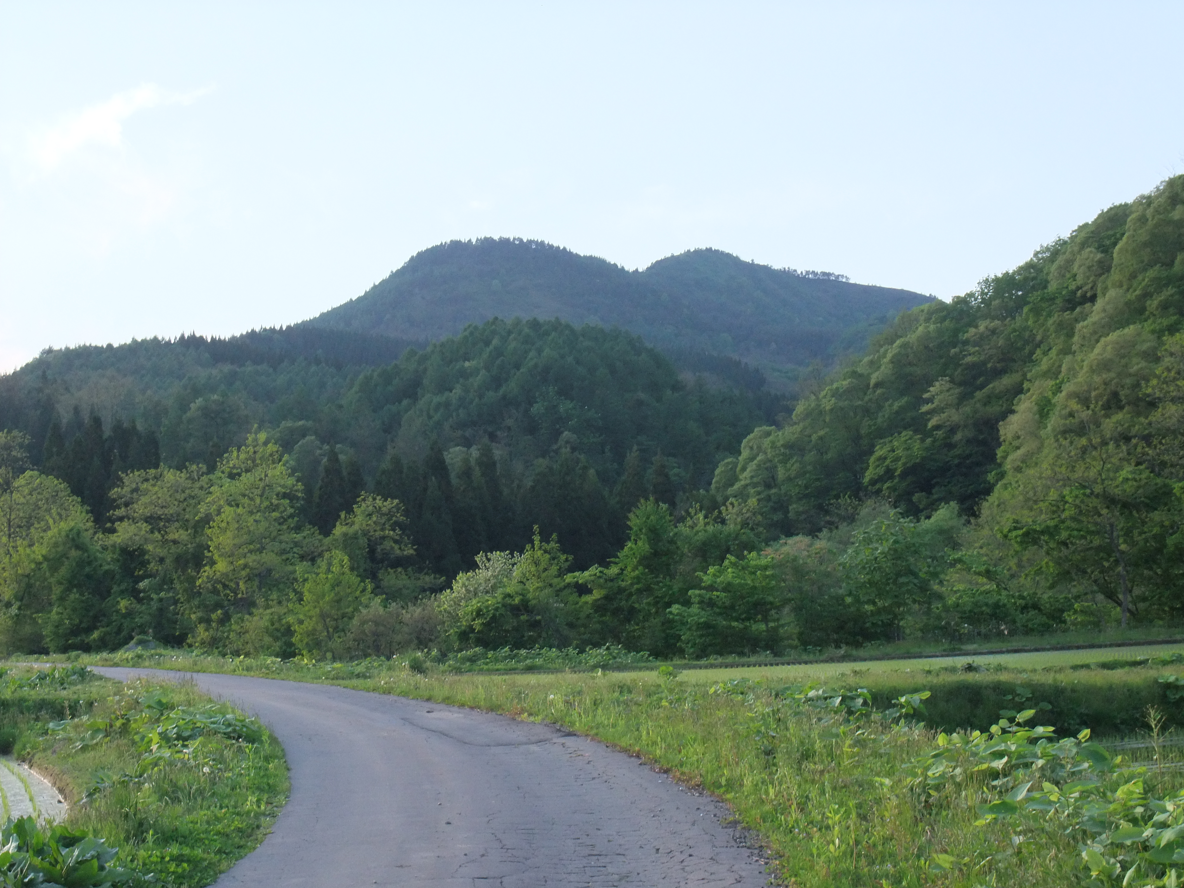 登山道近くの長木沢林道から見た羽保屋山